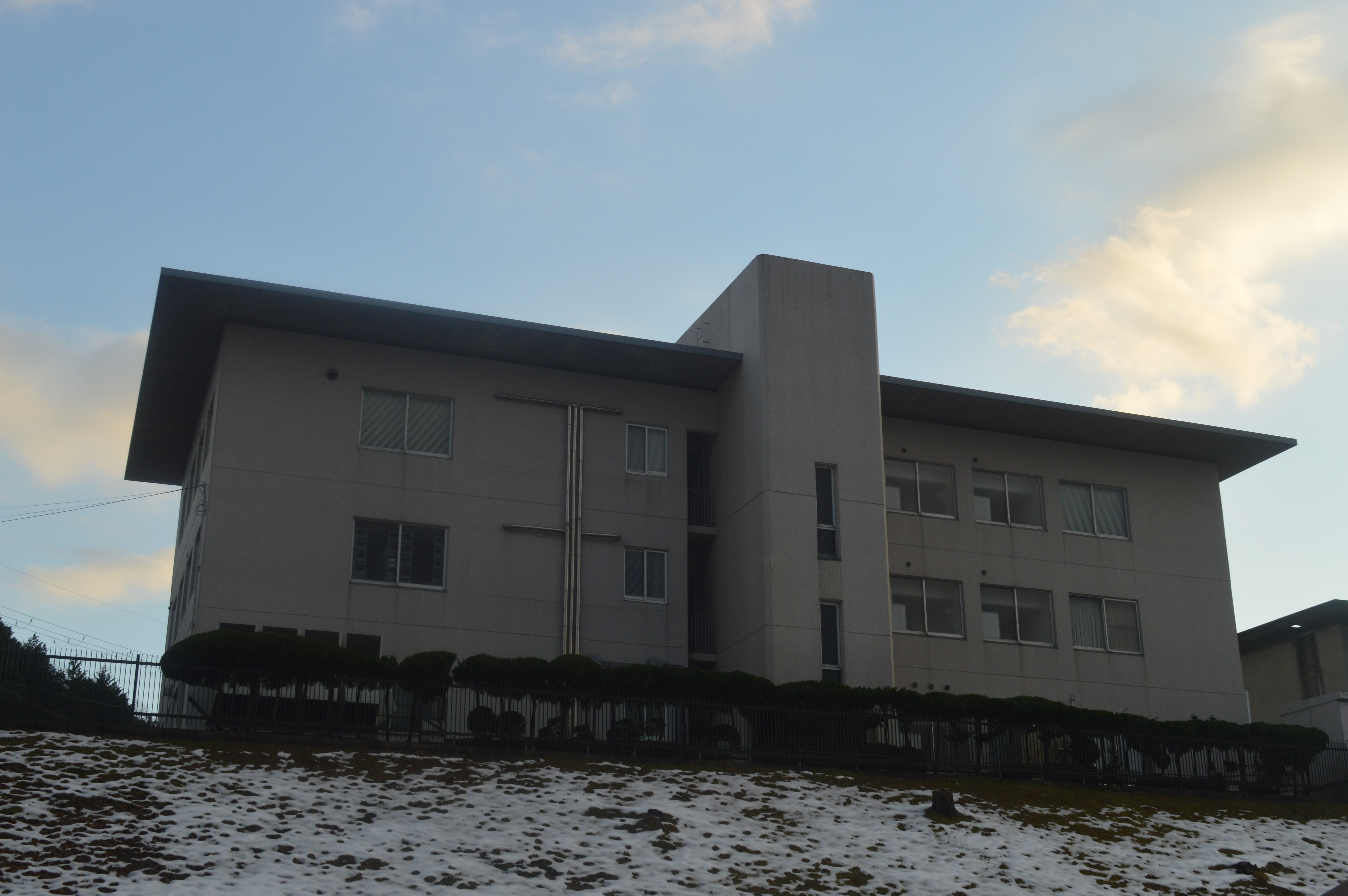 京都府京丹後市峰山町にある京丹後簡易裁判所。